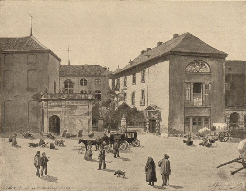 Burgplatz im Jahre 1859. Links der Galeriebau, rechts die Akademie, das ehemalige Schloß. Nach einer Zeichnung von A. Frank (das Bild war 1916 Bestand des Historischen Museums)